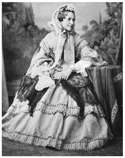 Юсупова Зинаида Ивановна (1809-1893) урожд. Нарышкина